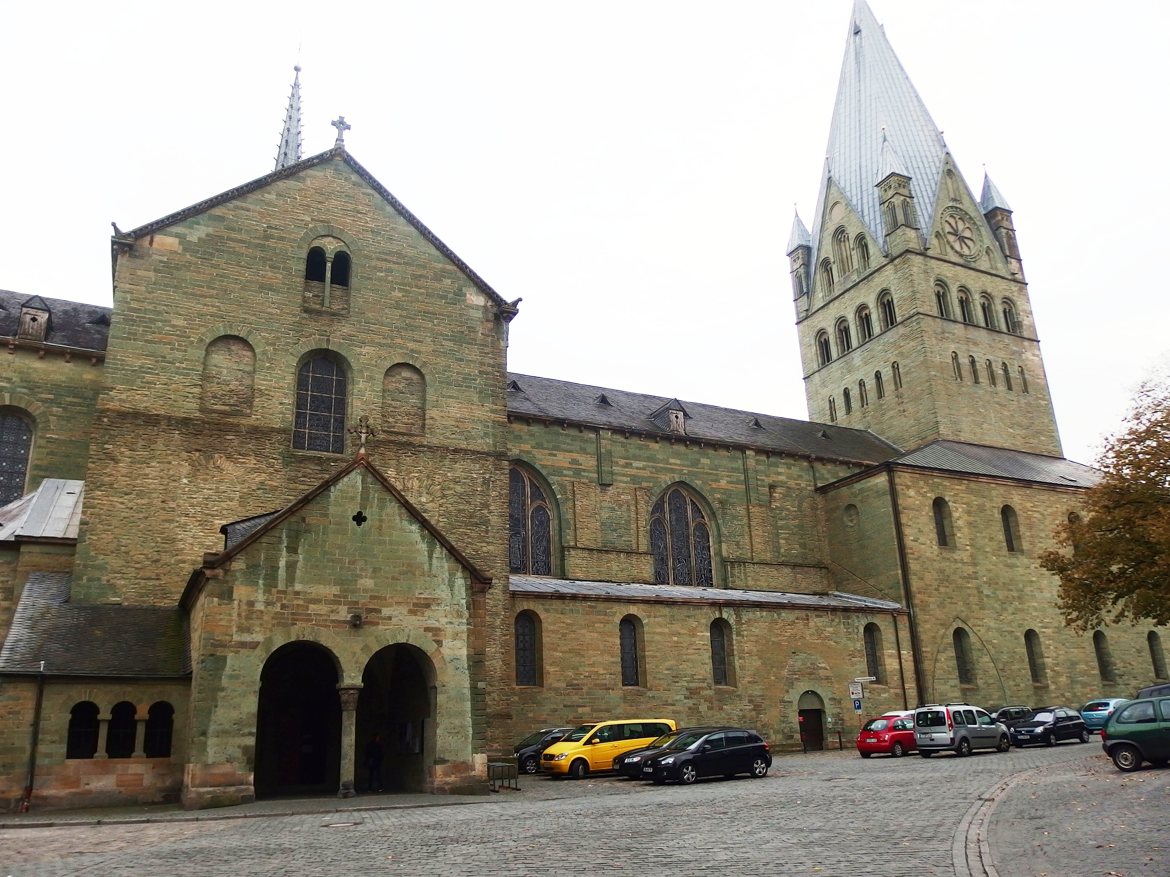 Soest, St. Patrokli-Dom.